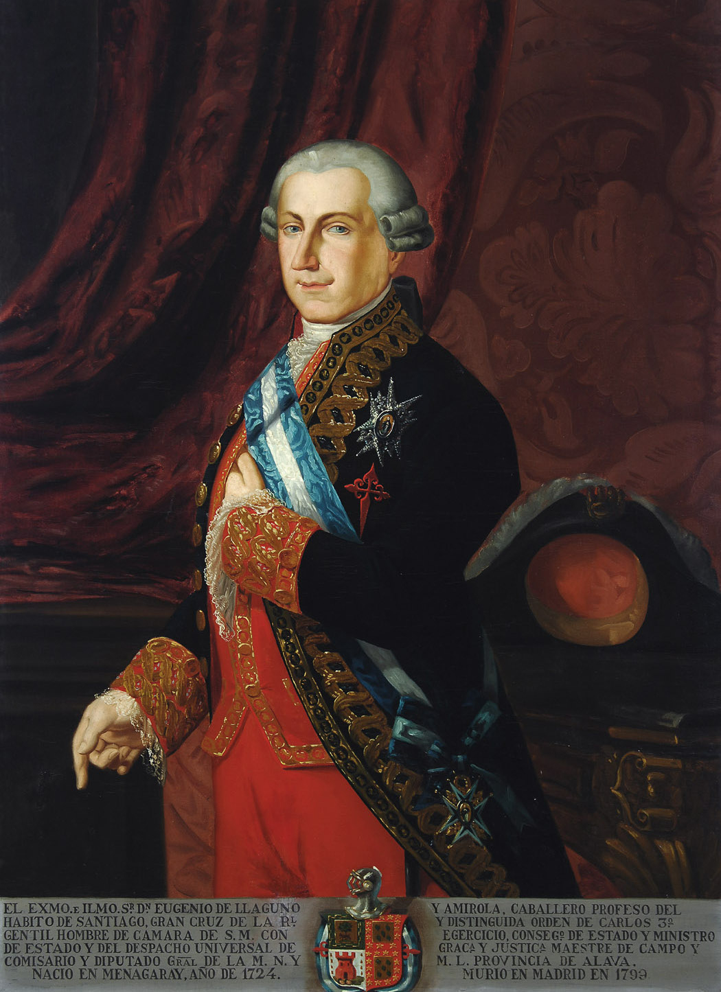 Eugenio de Llaguno y Amírola, político y hombre de Estado.